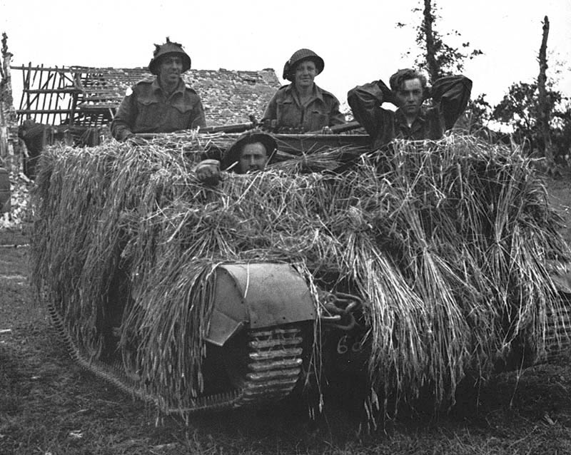 Des soldats canadiens avec un membre de la Luftwaffe fait prisonnier à l'aéroport de Carpiquet (07/1944)